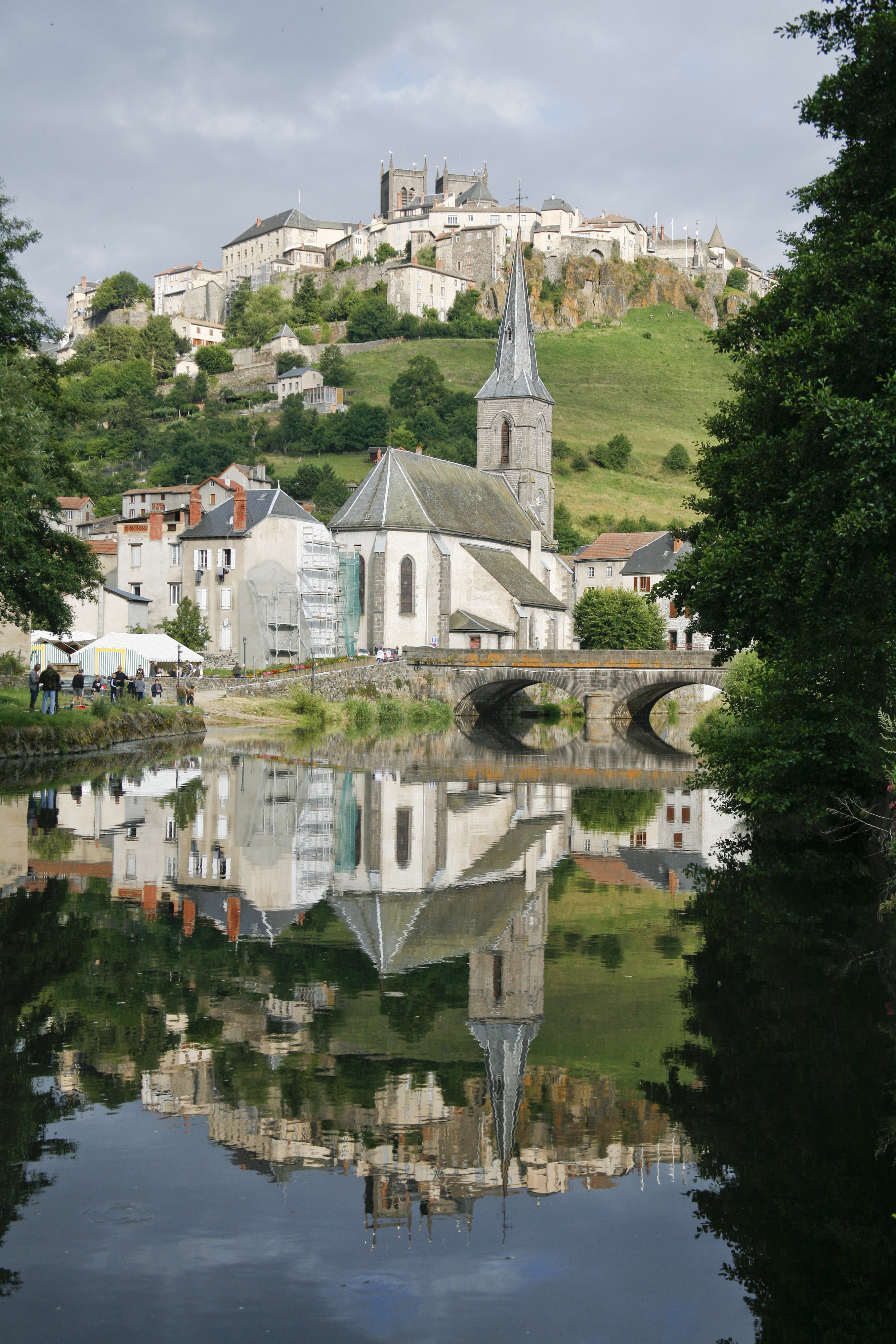 Saint-Flour depuis les berges de L'Ander